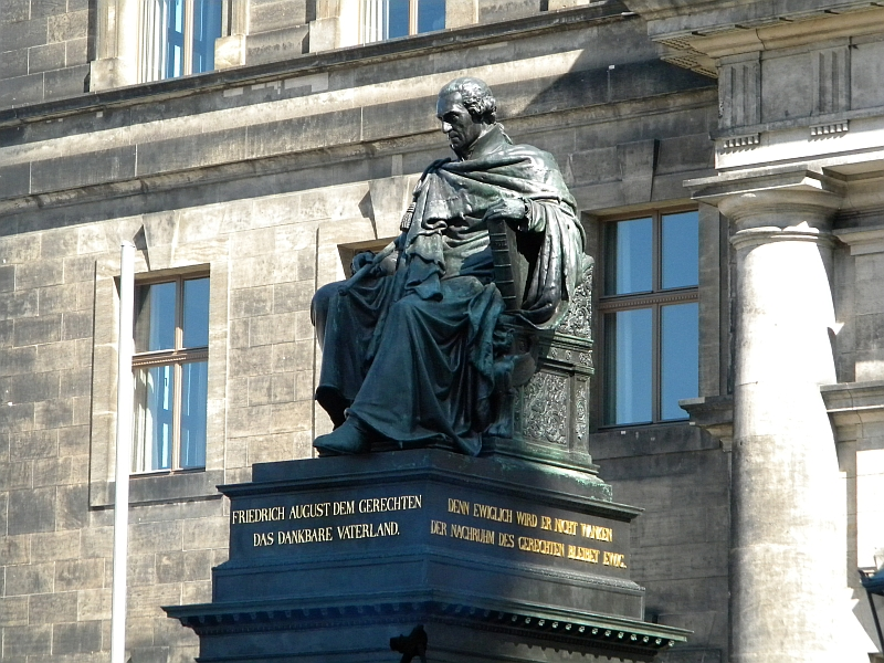 Friedrich August Skulptur bei Stallhof, 01069 Dresden, Deutschland